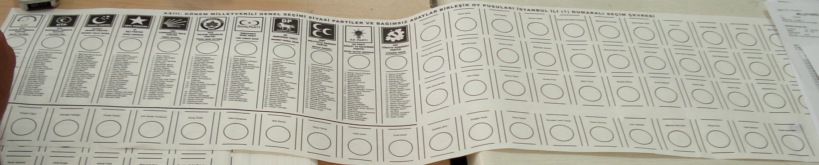 2007 Türkiye Genel Seçimler Oy Pusulası